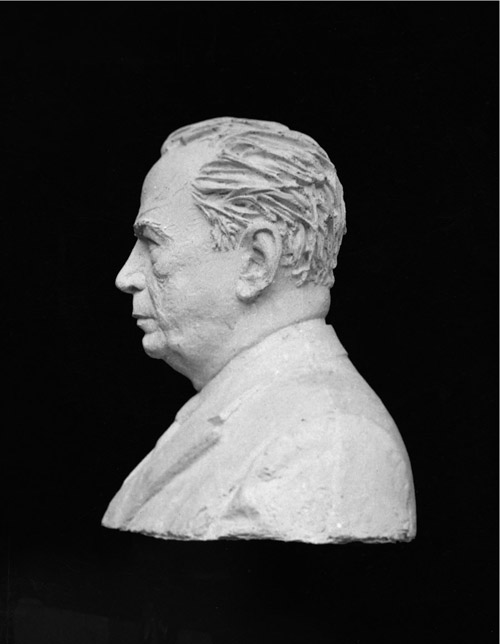 Molde en positivo del busto de Rómulo Gallegos hecho por el escultor italiano José Pizzo, 1948. Fotografía en blanco y negro 10,2 x 9,4 cm